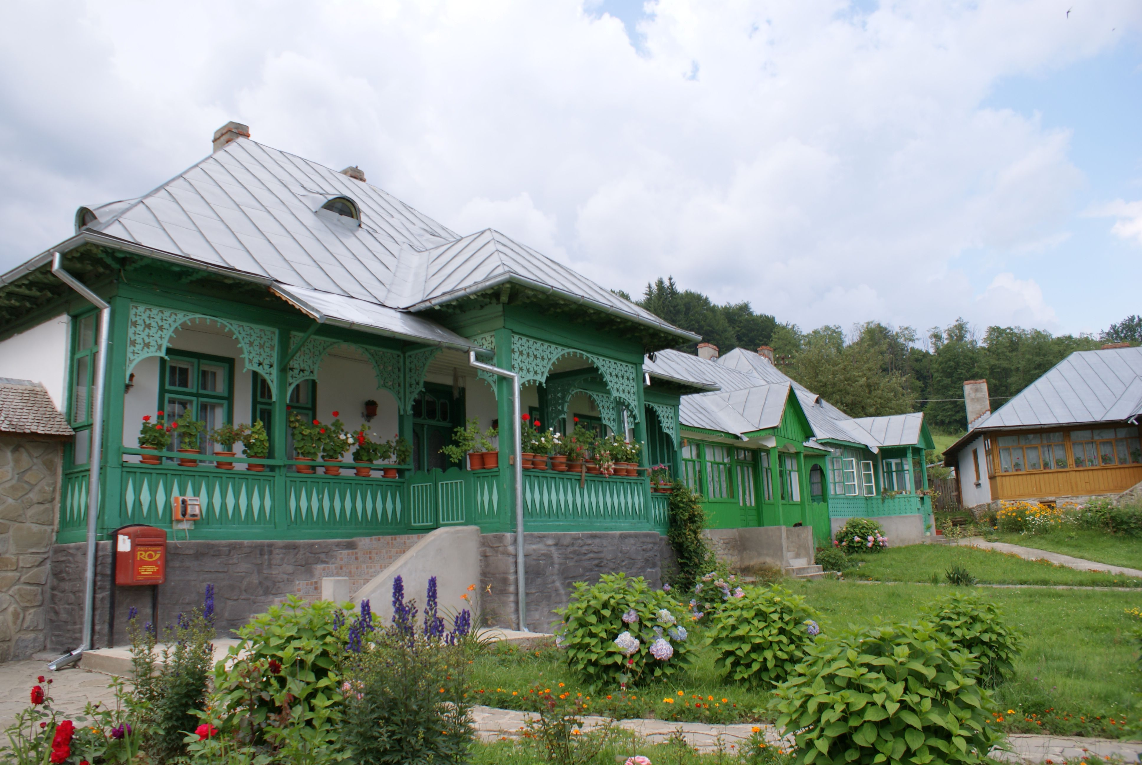 Chilii în incintă 03